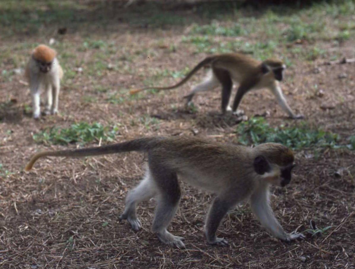 Babouins de la région de Boundiali, en Cote d'Ivoire